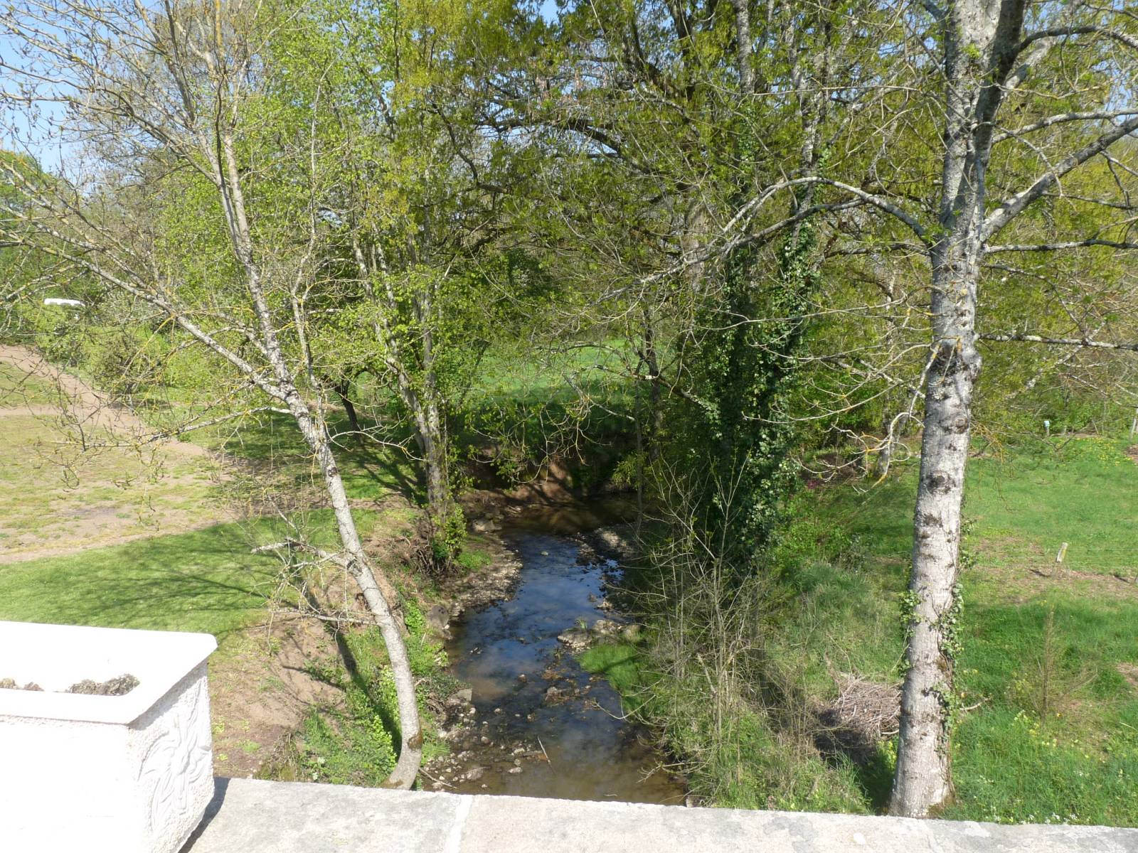 La Blourde à Oradour-Fanais, Charente, France